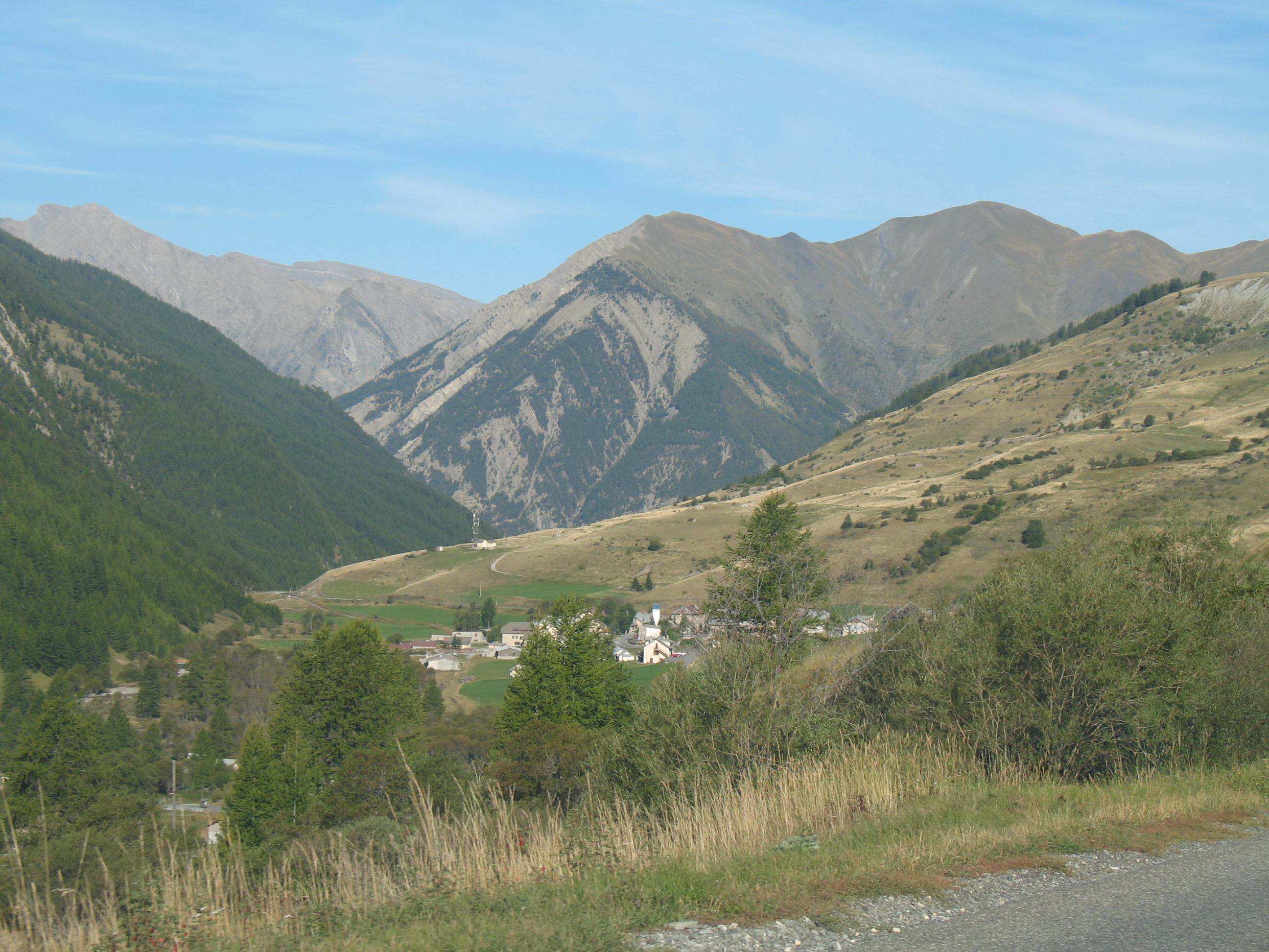 Colle della Maddalena (Italia) - Col de Larche (France)